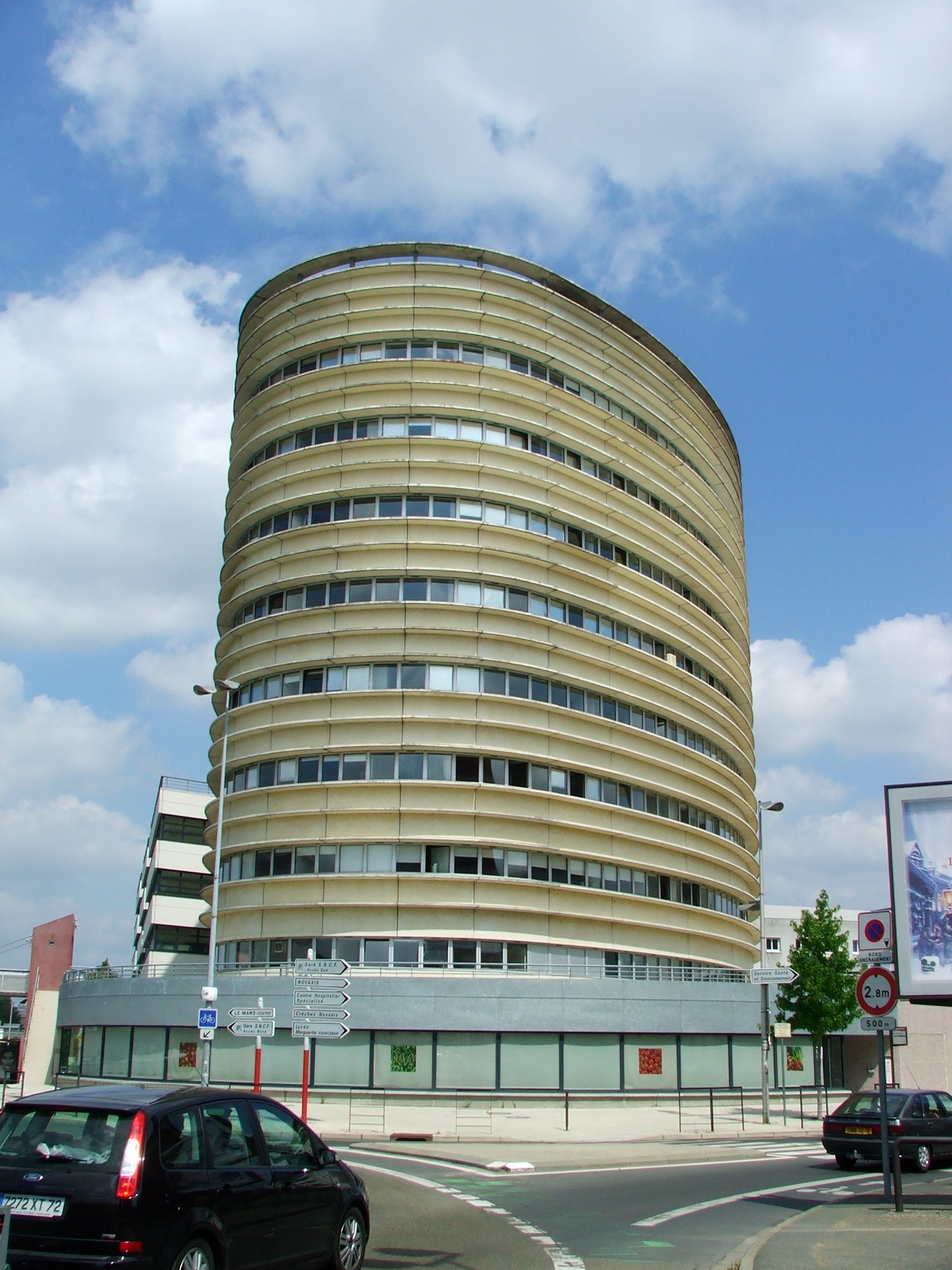 La Tour Solaire du Mans dans le quartier Novaxis, siège social du groupe CIE Vitale, développeur en charge de la carte Vitale d'assurance maladie.